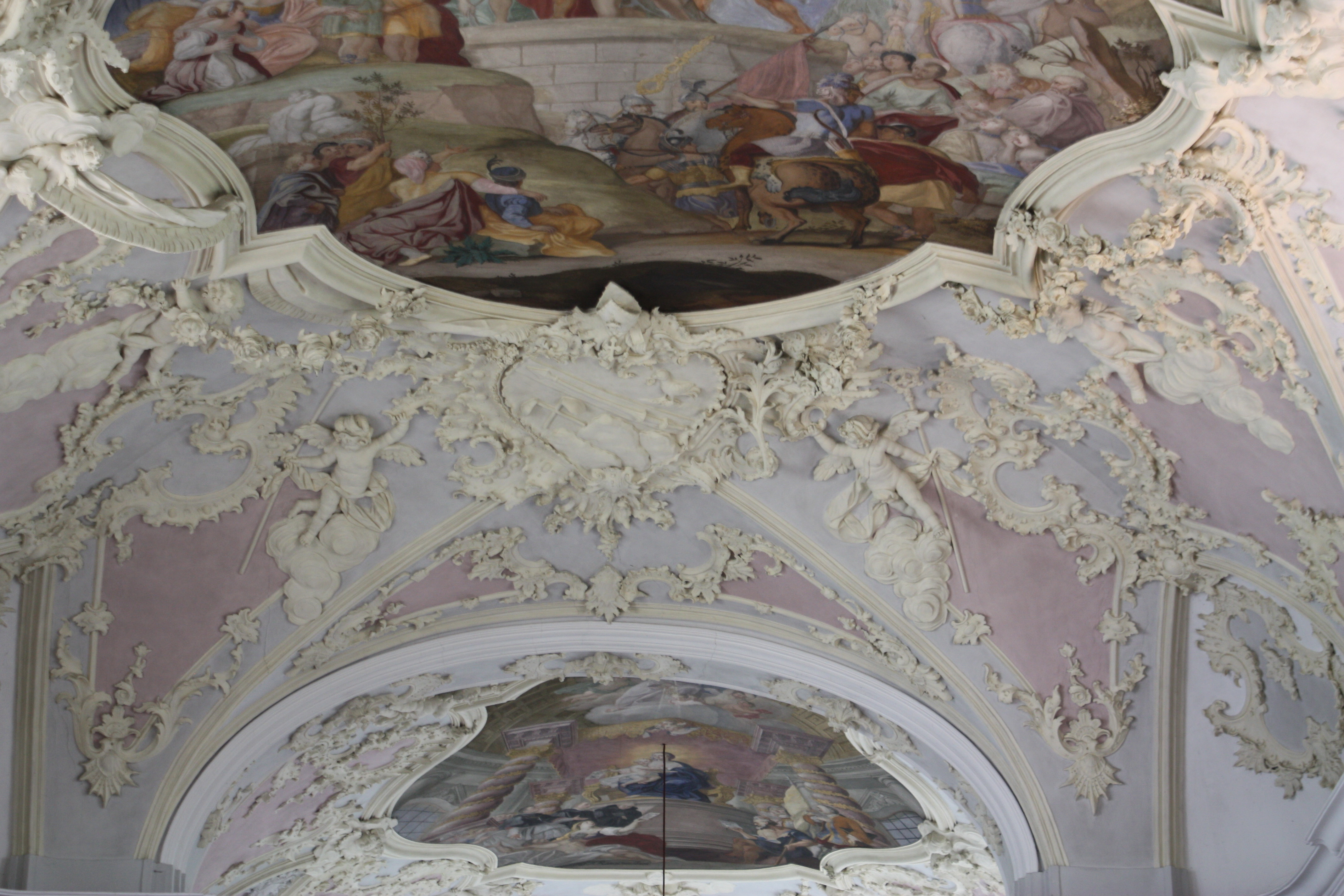 Kath. Pfarrkirche Mariä Himmelfahrt, 1760, Stuck v. B. Schreidter